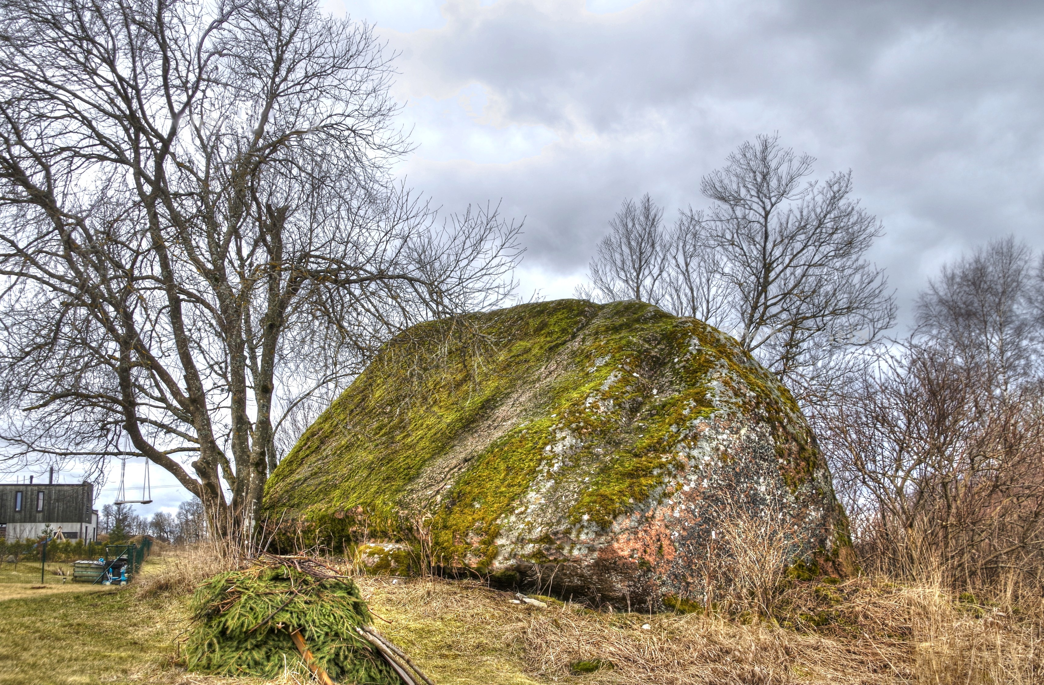 Valingu hiidrahn (ka: Valingu rahn) on hiidrahn Harju maakonnas Saue vallas Valingu külas.